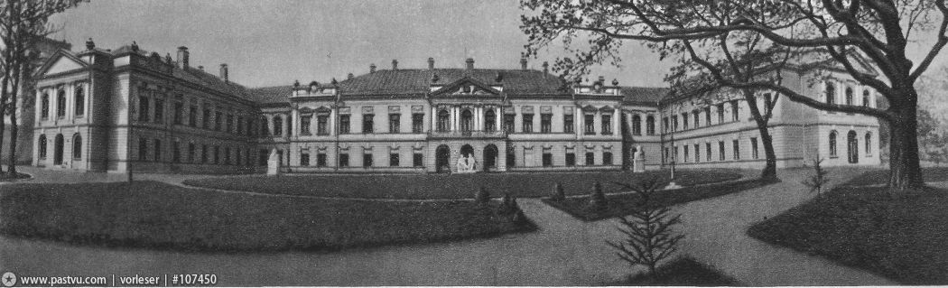 Усадьба Вяземских-Долгоруковых в Знаменском переулке